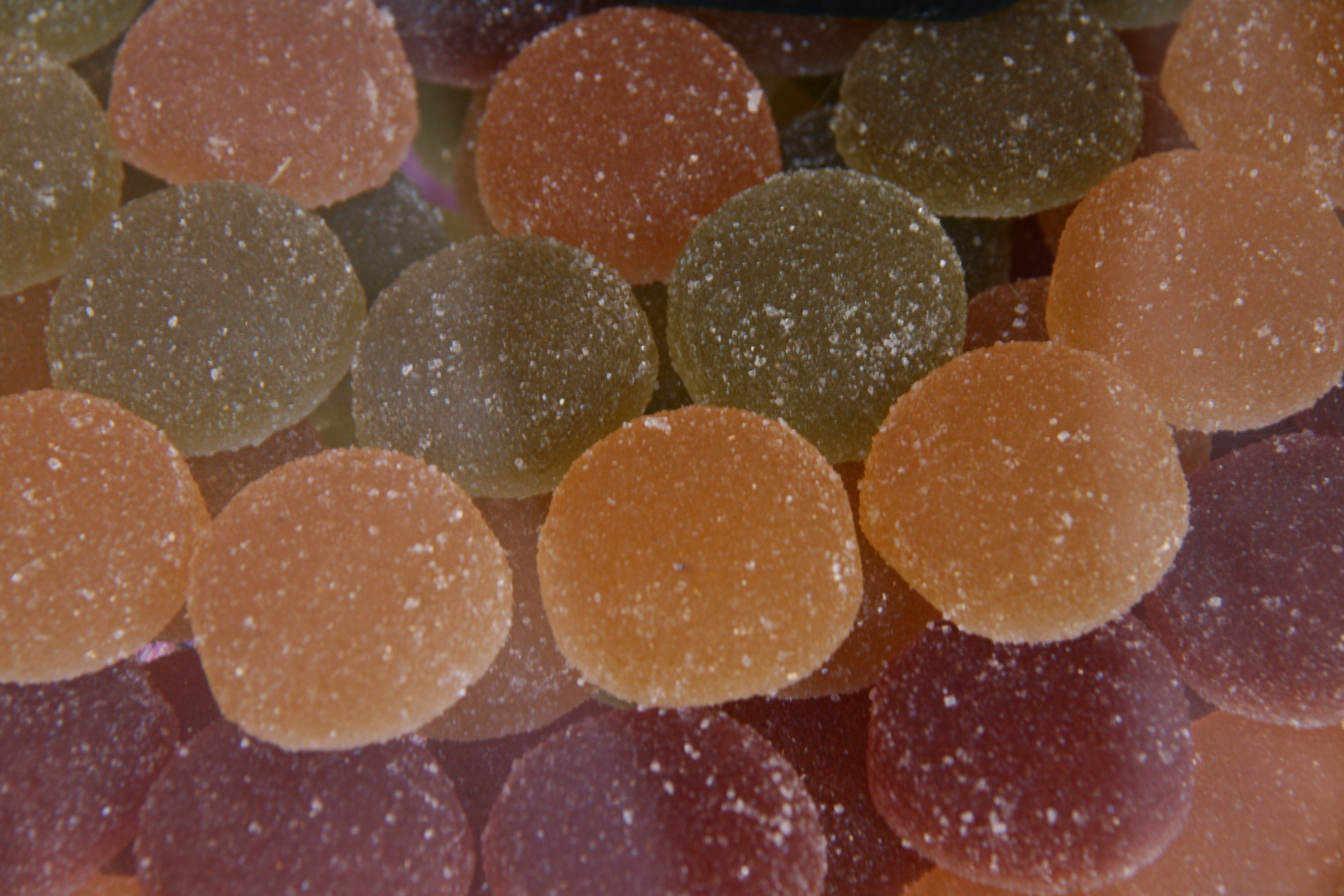 Fruta escarchada - La Violeta (Madrid)